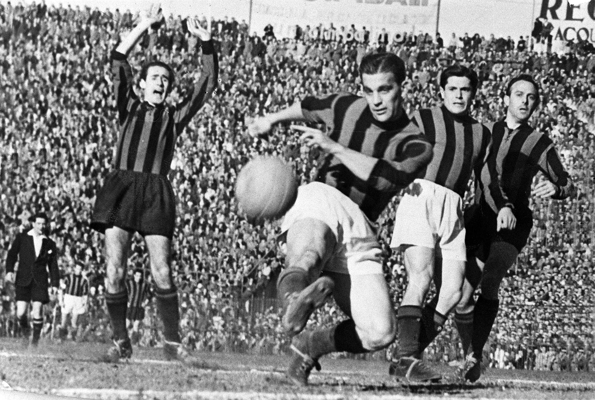 Milano, stadio San Siro, 25 marzo 1951. Il rossonero Gunnar Nordahl (al centro) realizza la rete decisiva nel corso del derby di Milano tra Inter e Milan (0-1) valevole per la 29ª giornata del campionato italiano di Serie A 1950-51.